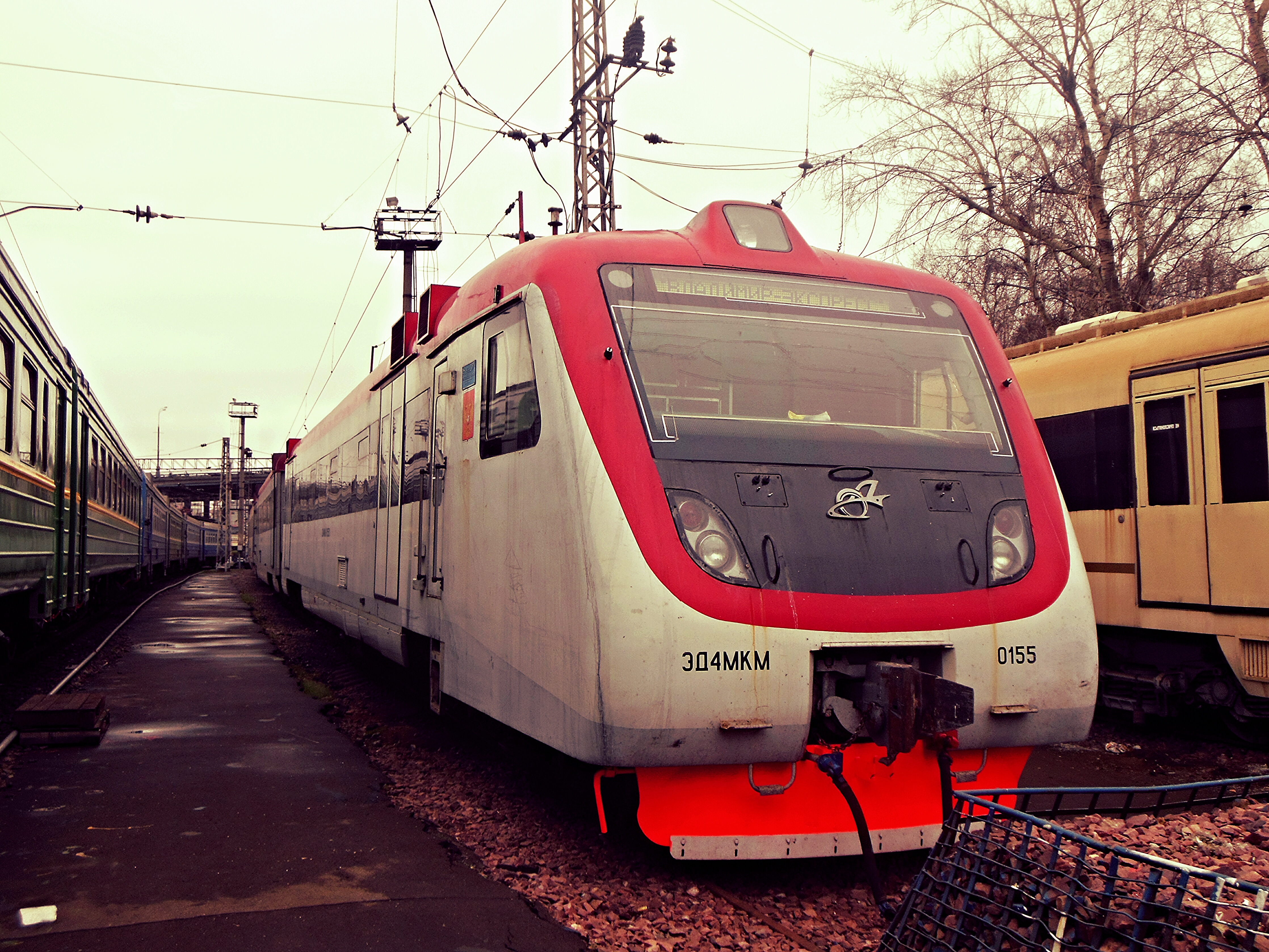 Электропоезд ЭД4МКМ-0155 в моторвагонном депо Москва-II.